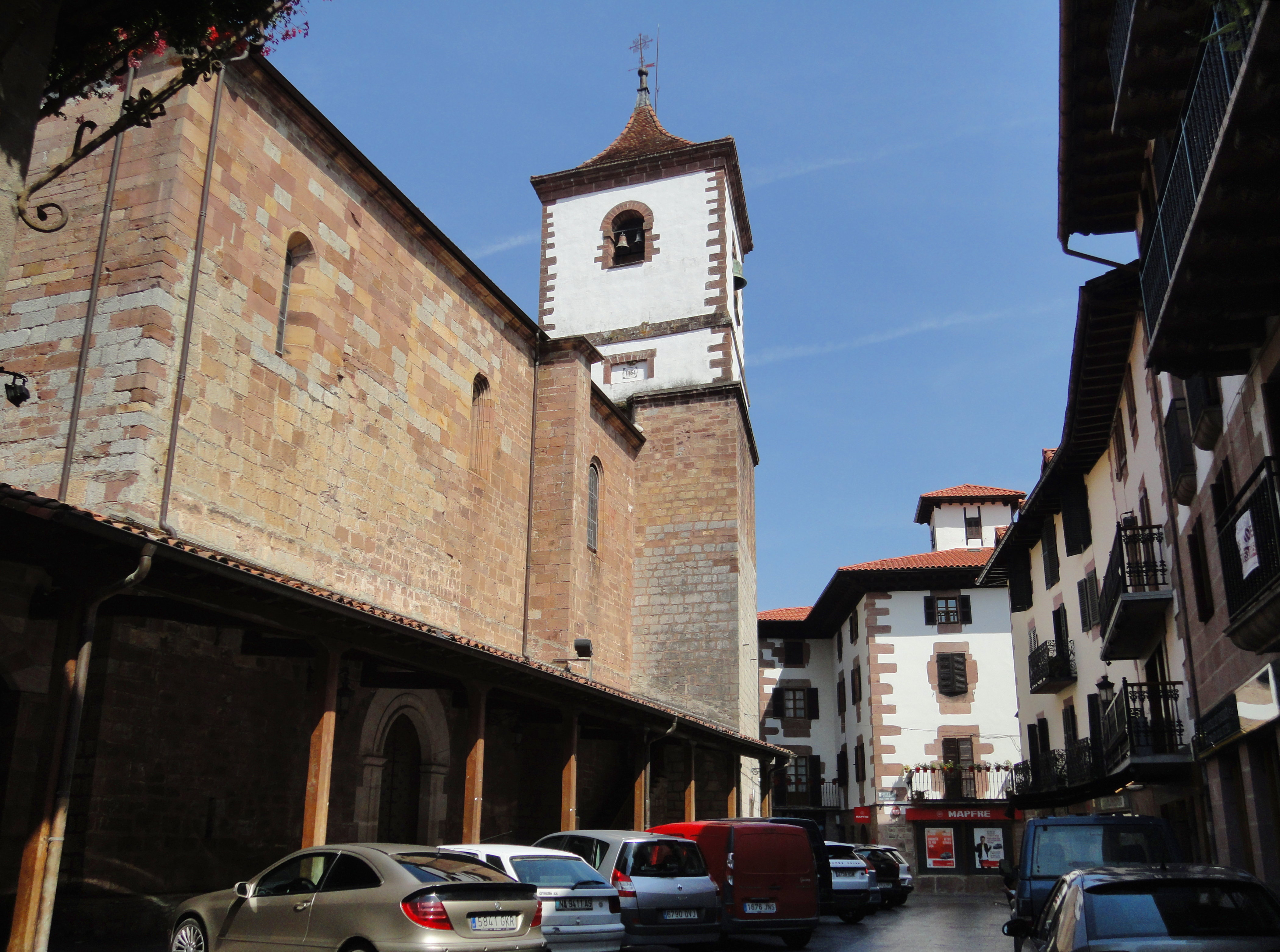 San Pedro eliza - Doneztebe